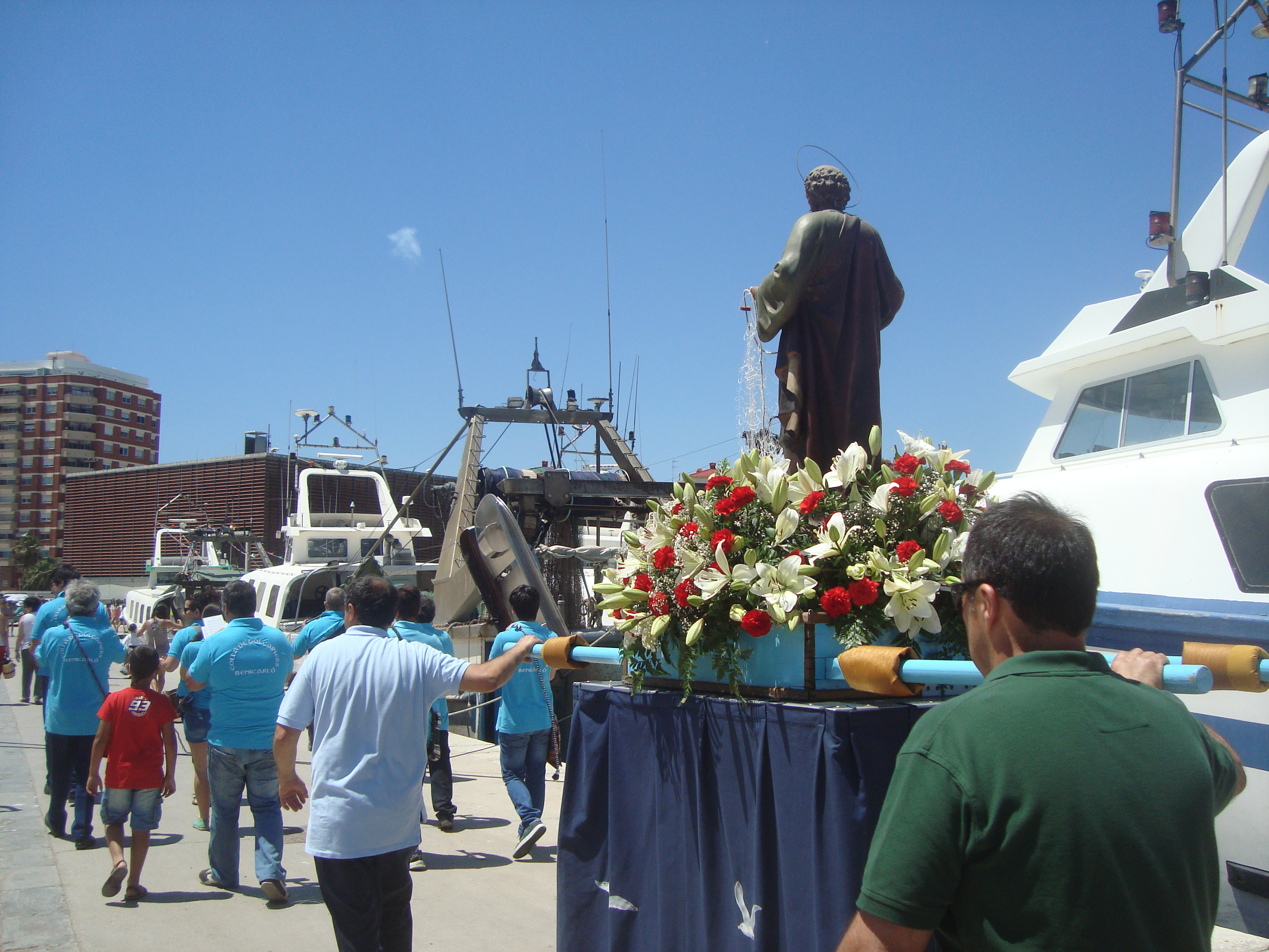 Romería marinera de Sant Pere de l'any 2014, Port de Benicarló